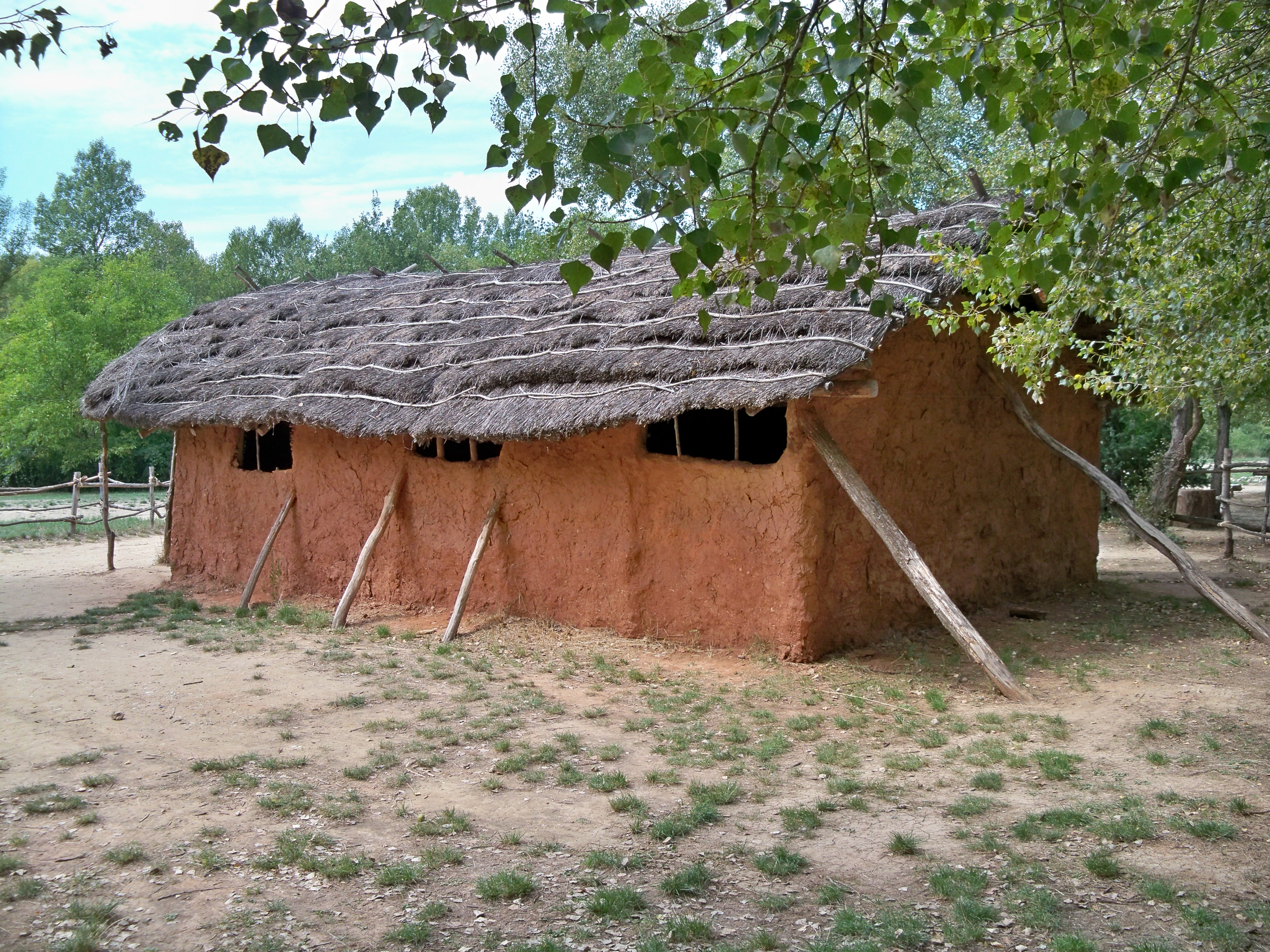 Reconstitution d'habitation néolithique à Quinson (04), France